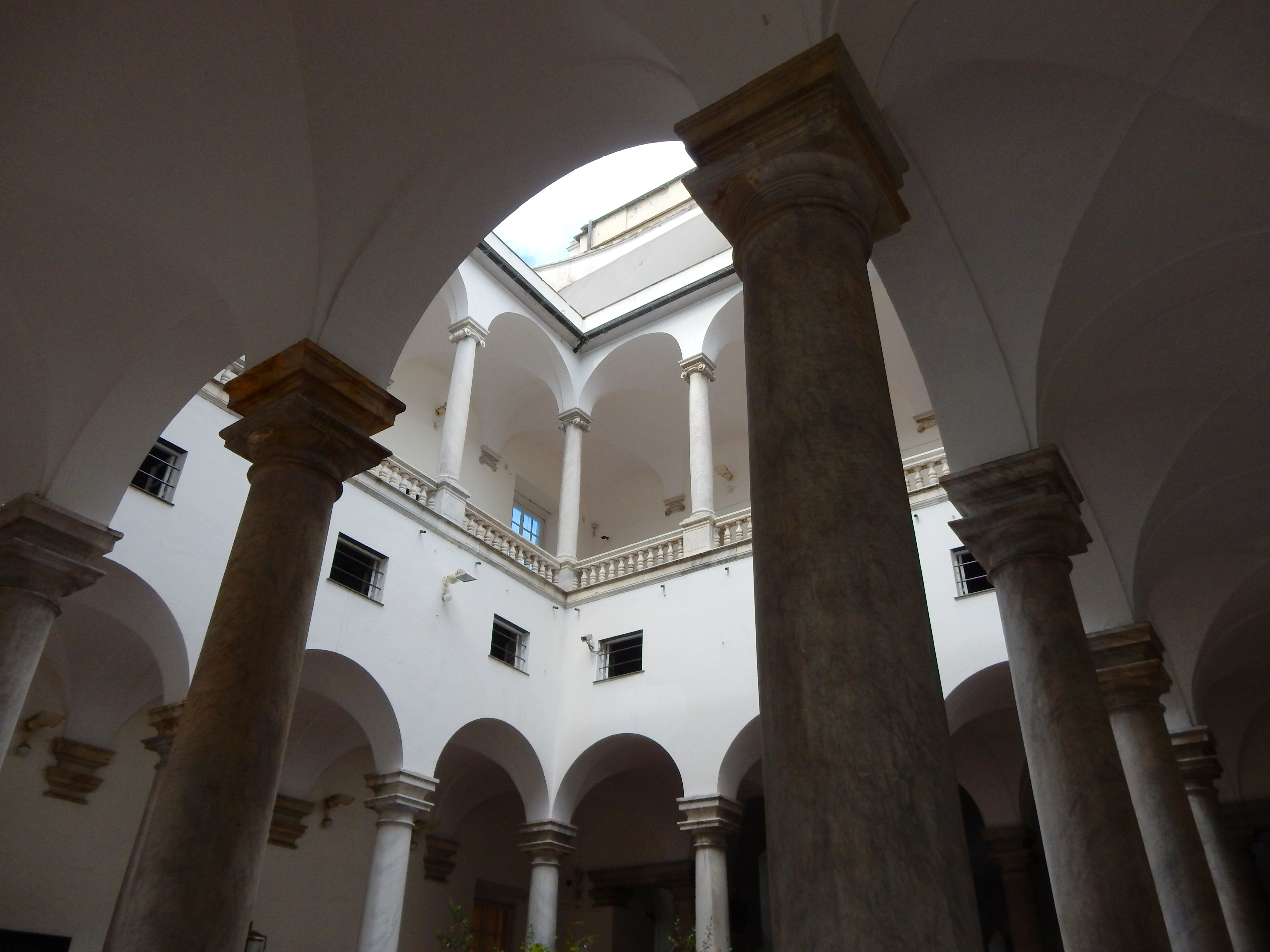 trattasi del Cortile inferiore - ingresso - Palazzo Ducale di Genova